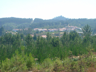 Vale de Vaíde, vista de Sudoeste